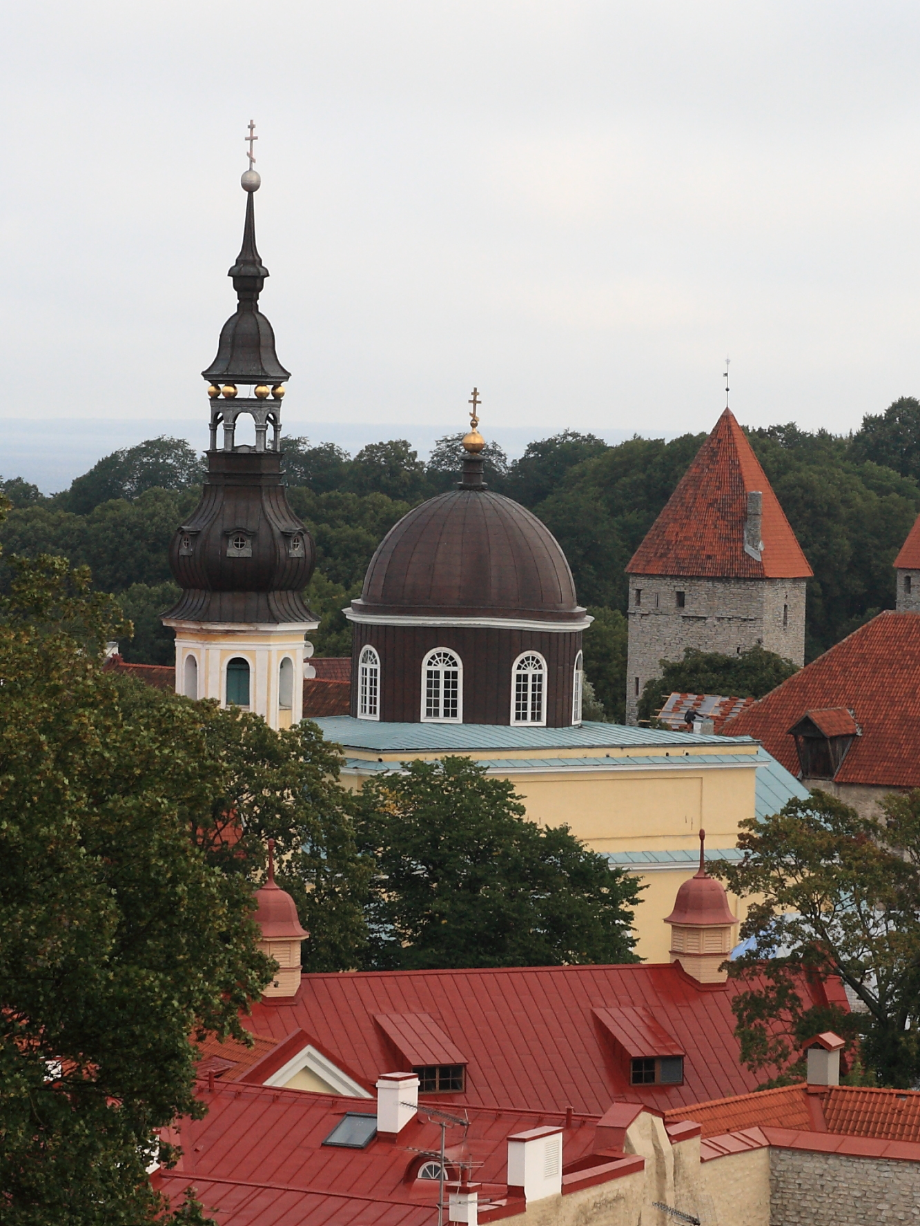 Talinn, Issanda Muutmise kirik